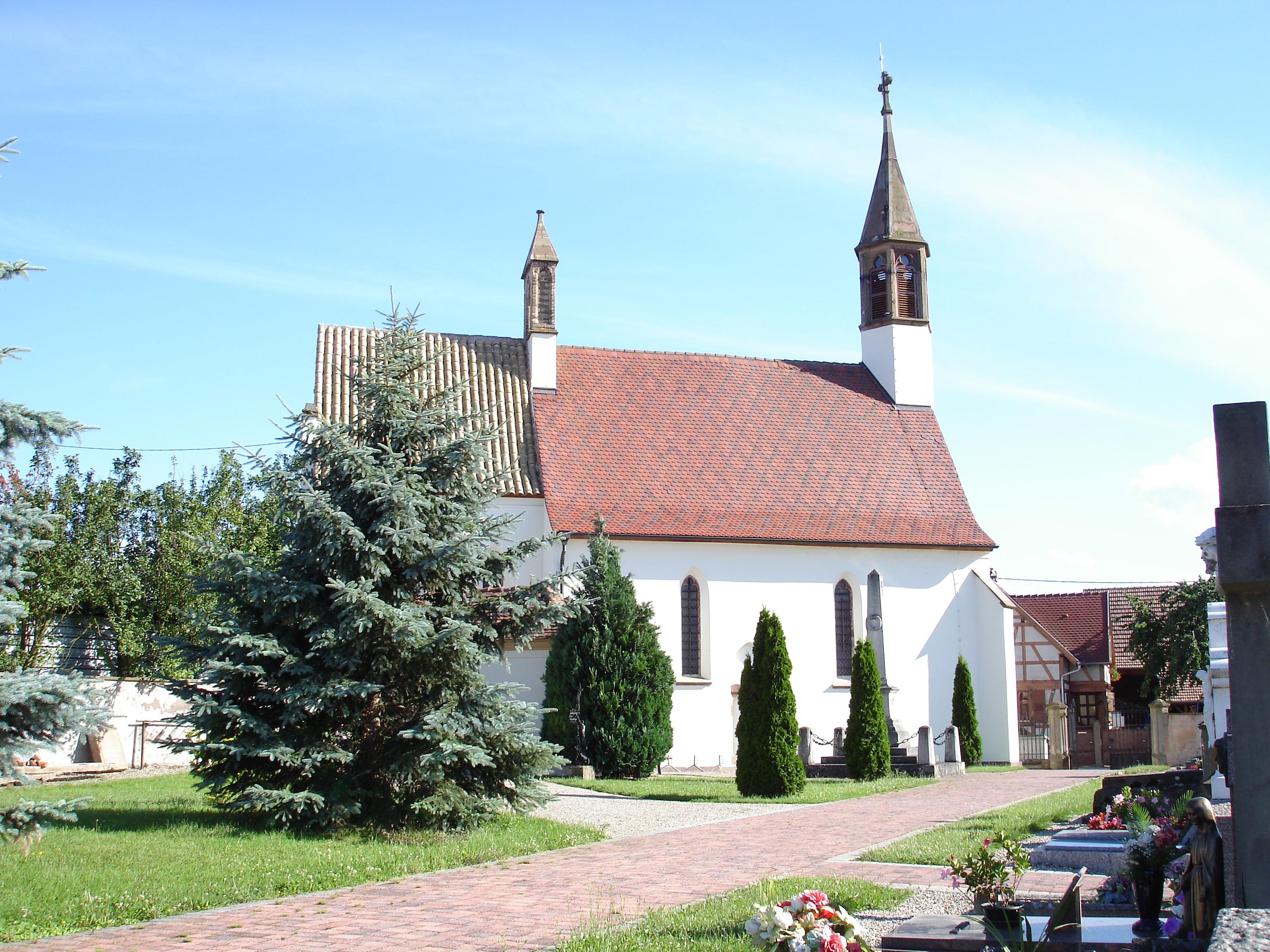 Chapelle Notre-Dame-du-Grasweg de Huttenheim, vue extérieure